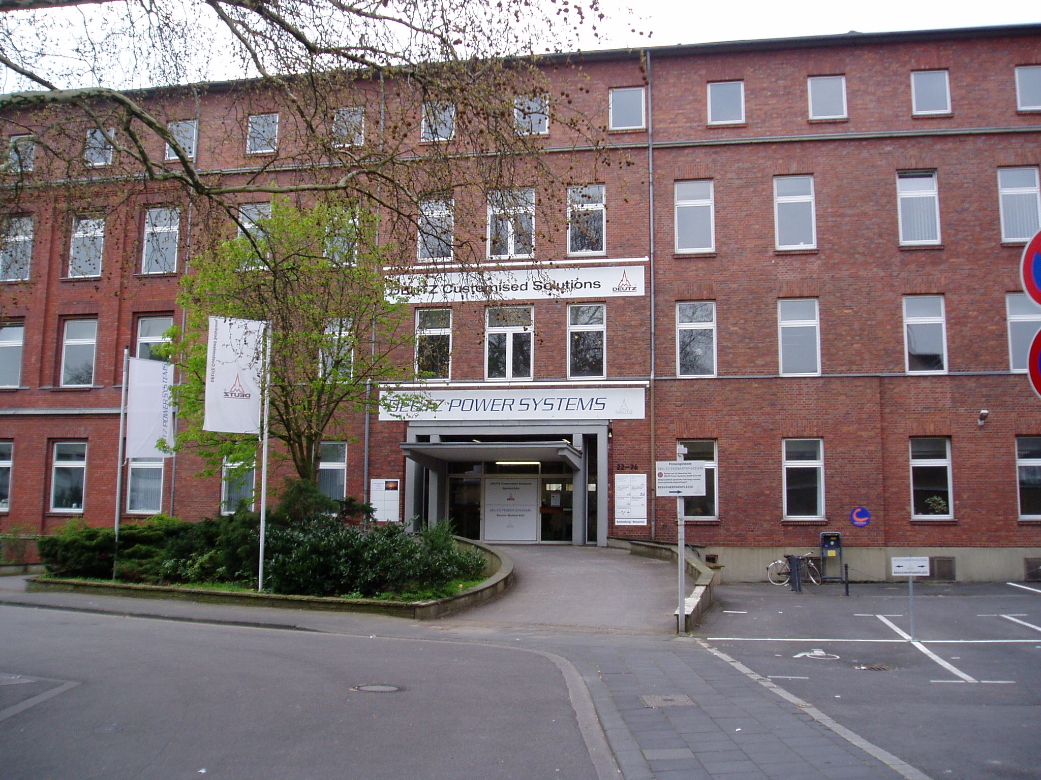 Köln-Kalk - ehemaliges katholisches Krankenhaus